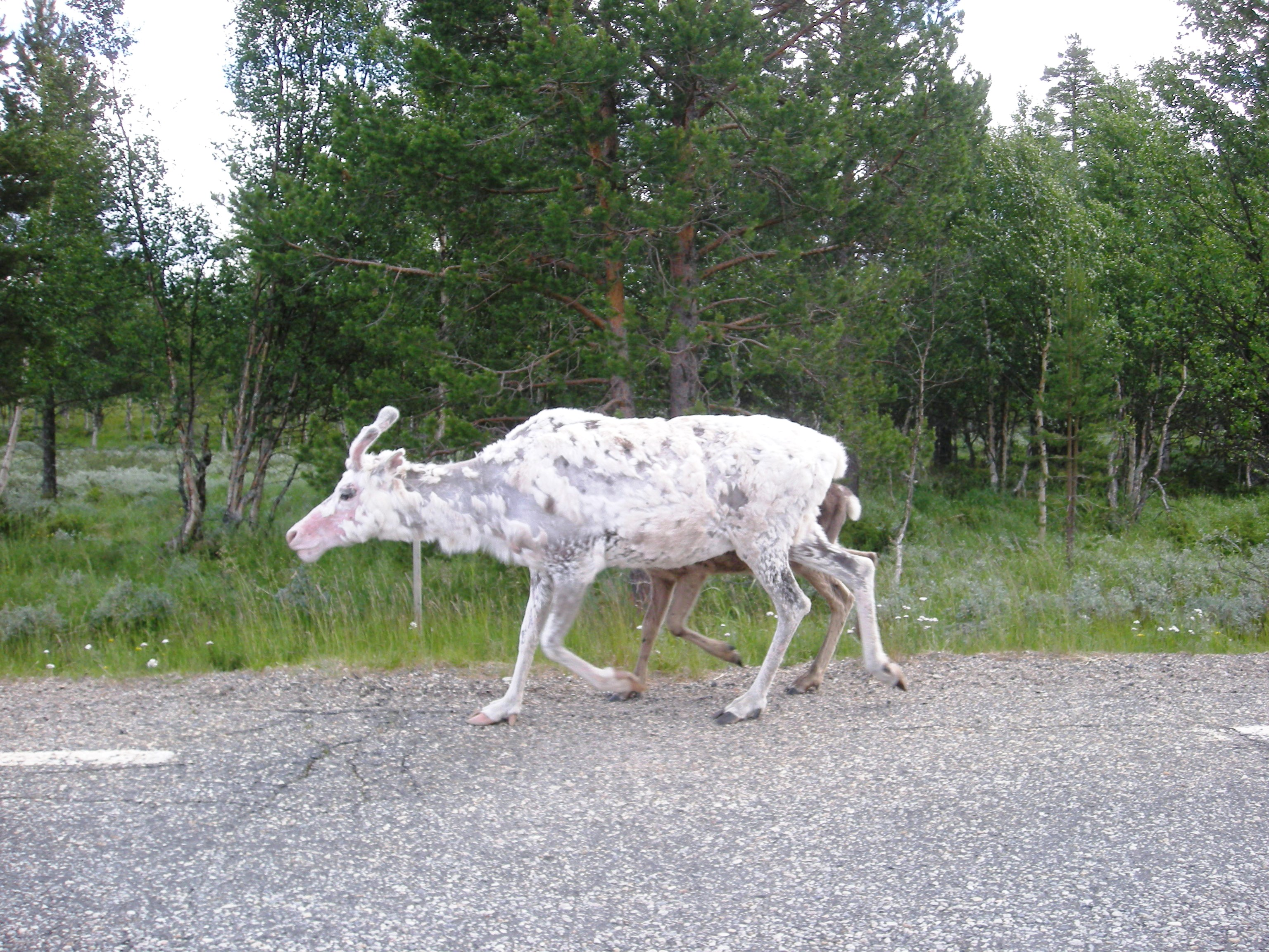 Reinsdyr ved fylkesvei 654 (øst for Femunden)